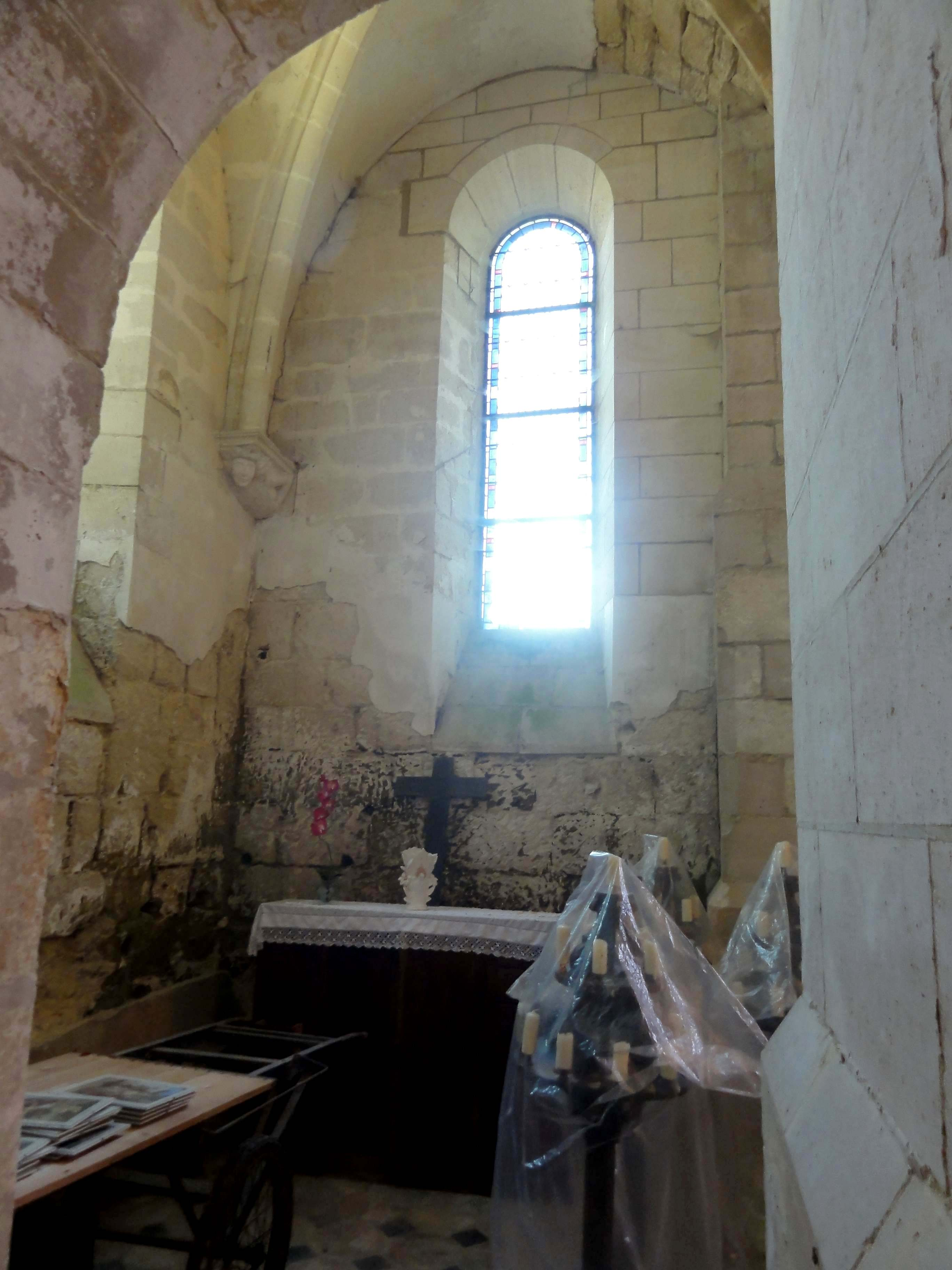 Croisillon nord, vue vers l'est.